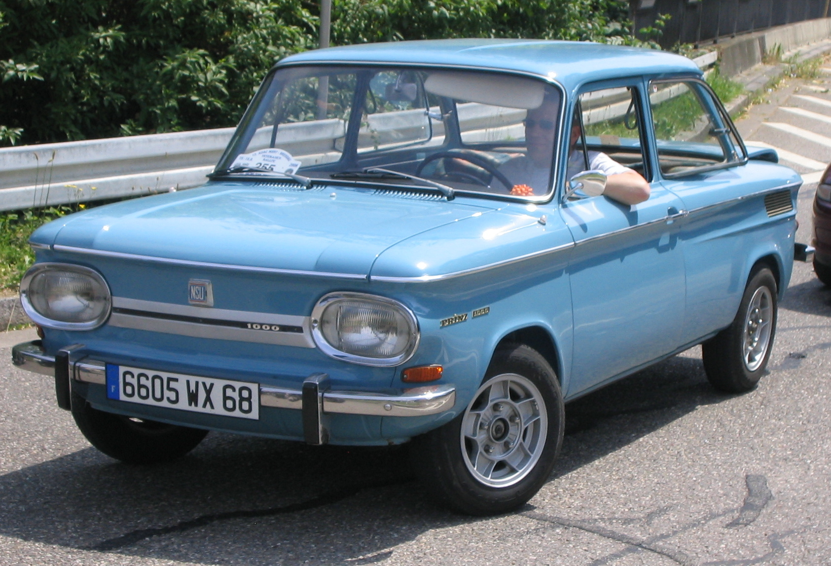 aufgenommen während eines Oldtimer-Treffens im Emmendingen, Deutschland